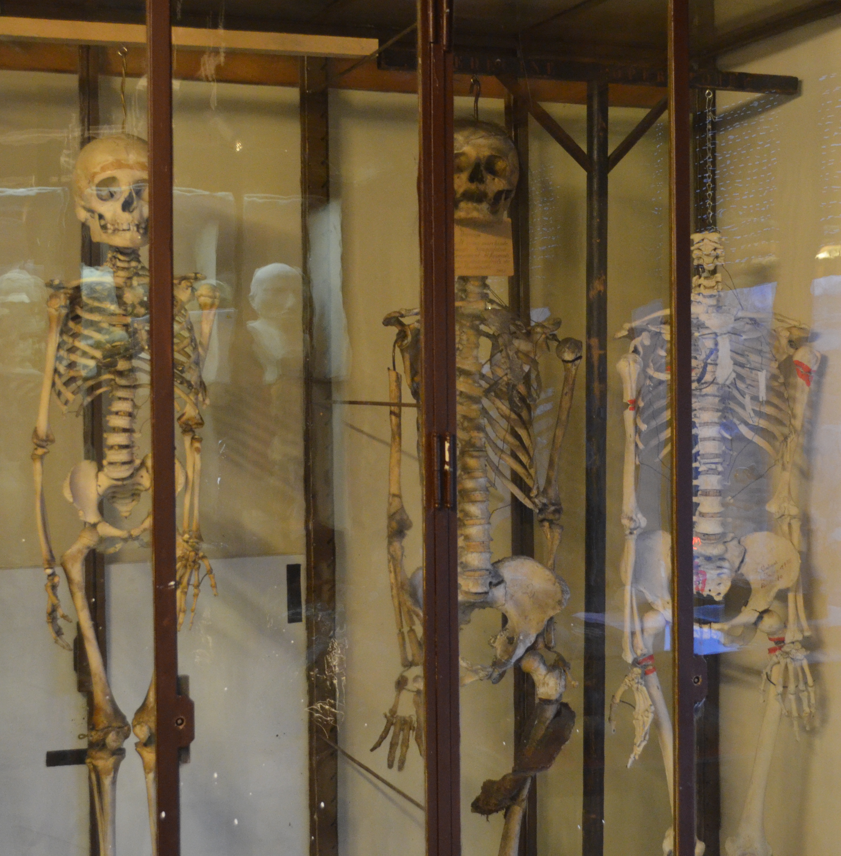 Squelettes réassemblées de victimes de luigi Richetto.